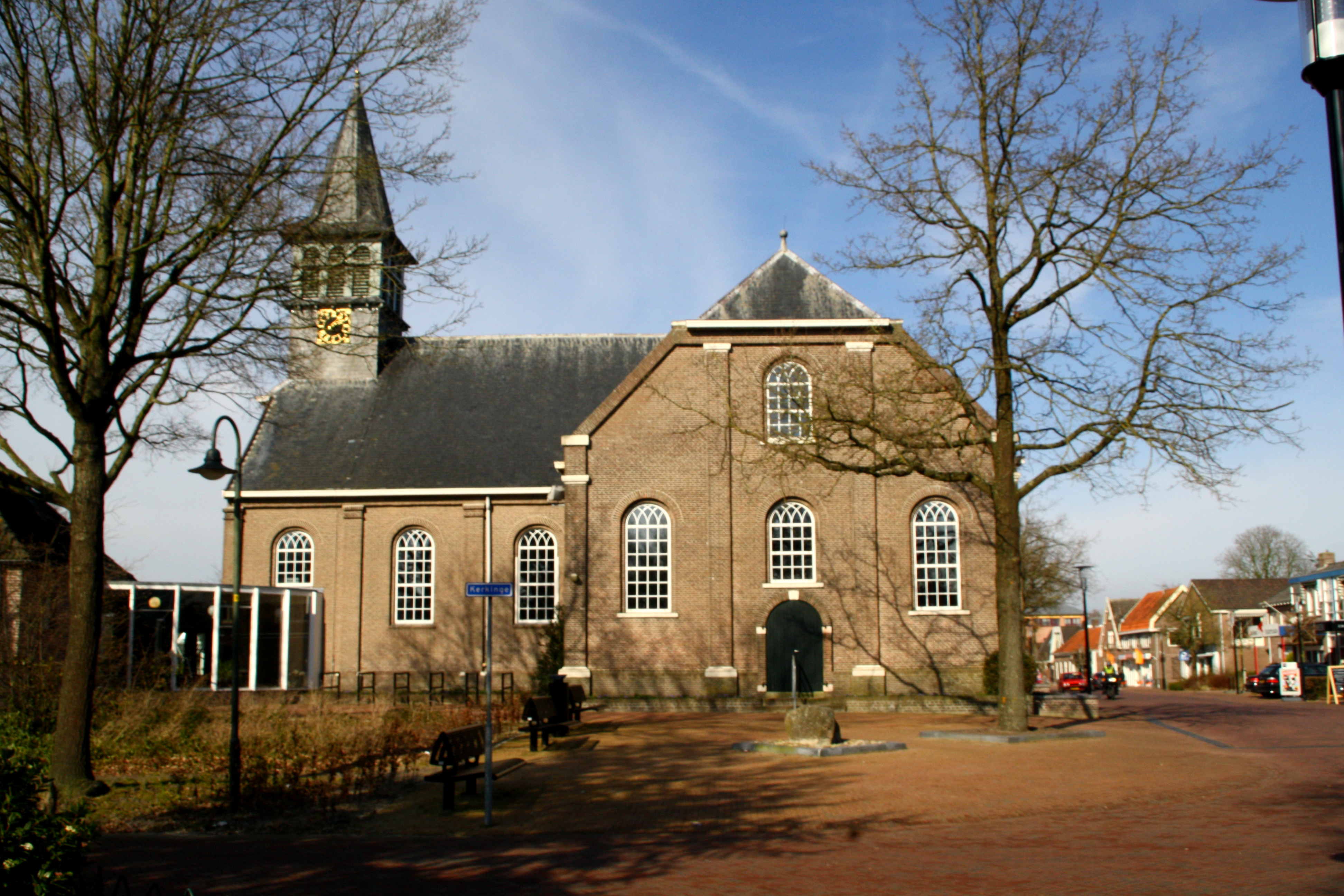 Zuidwolde - Hervormde Kerk